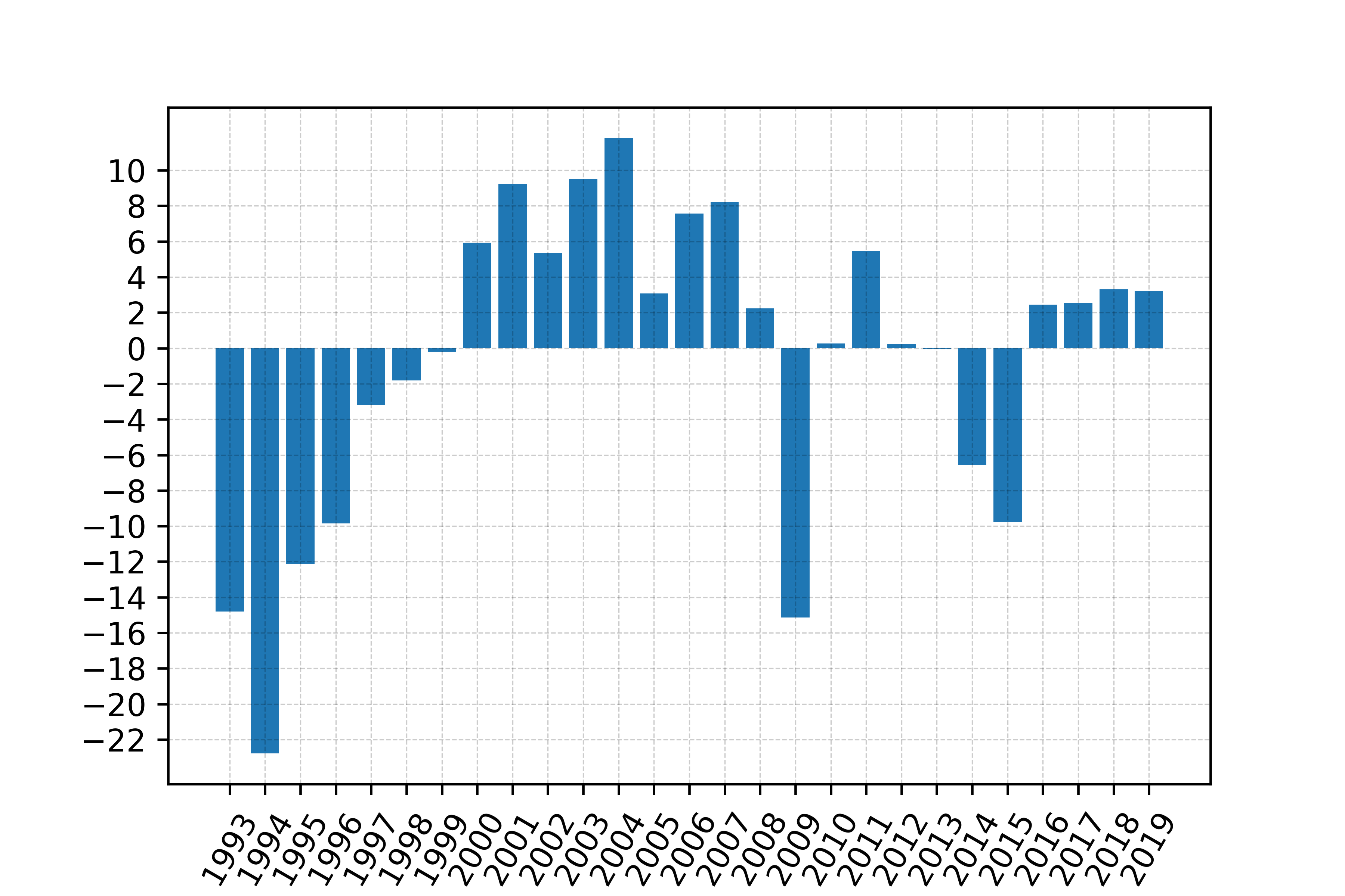 Графік відносного росту українського ВВП (по ПКС) в постійних цінах за даними МВФ починаючи з 1993 року